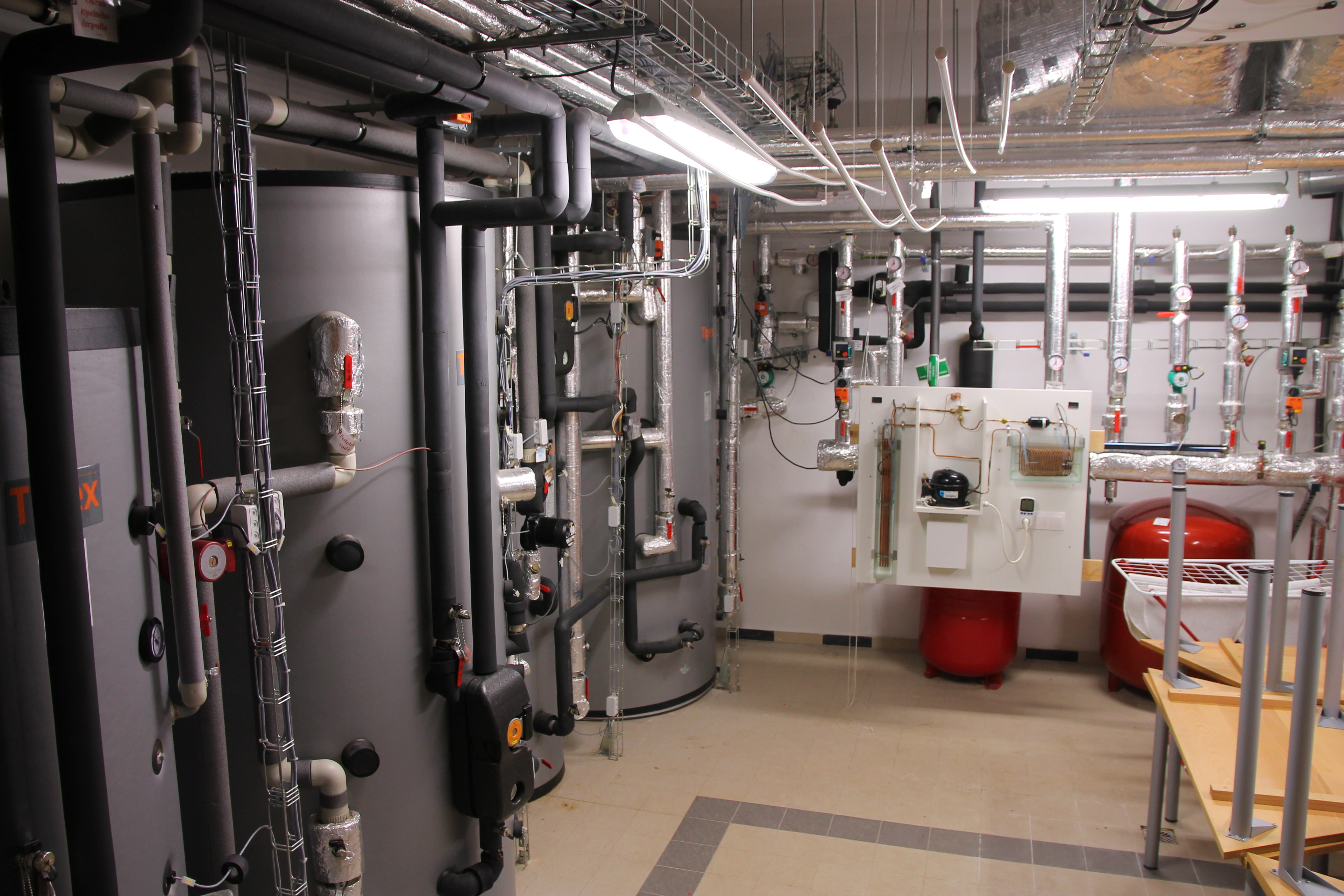 Kotelna skautské základny Kaprálův mlýn, Ochoz u Brna